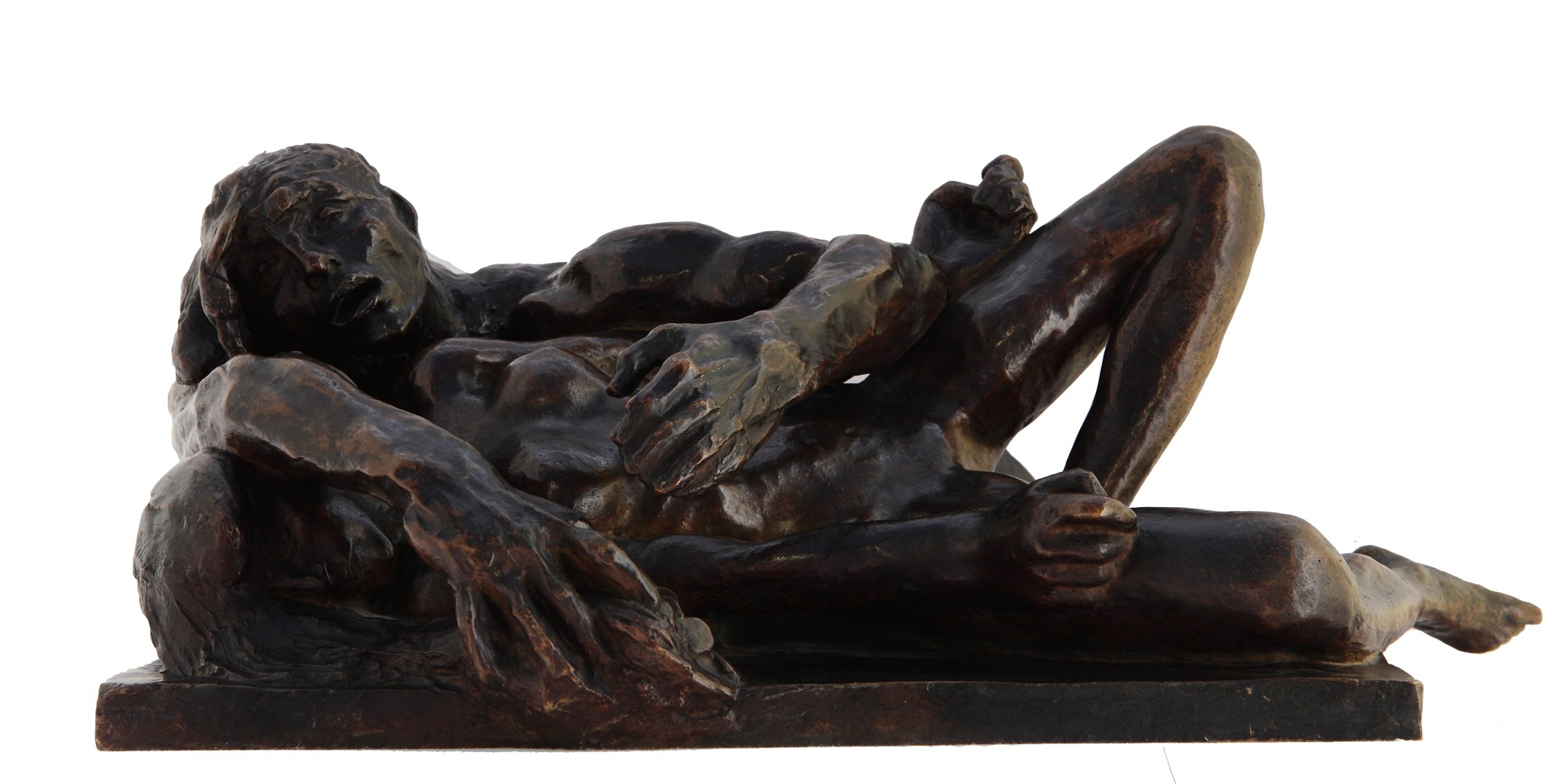 Auguste Rodin, La luxure et l'avarice (La lujuria y la avaricia). 1887. 21 x 42 x 52 cm, modelado y vaciado de bronce patinado. Inv. 8562.